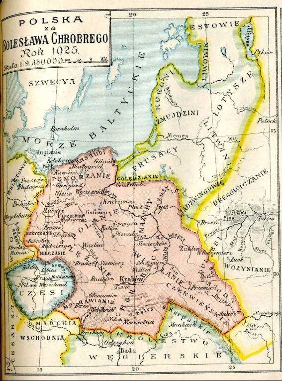 Państwo Bolesława Chrobrego w "Atlasie historycznym Polski" J. M. Bazewicza z 1918 roku.